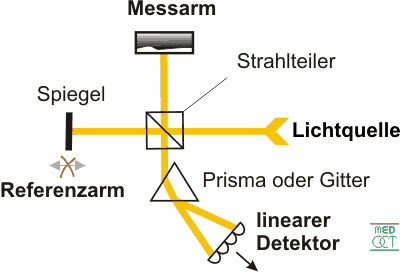 Prinzip Frequenz-Domänen OCT